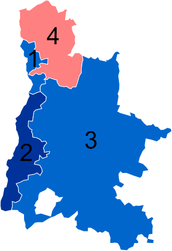 Résultats des élections législatives de la Drôme en 2012